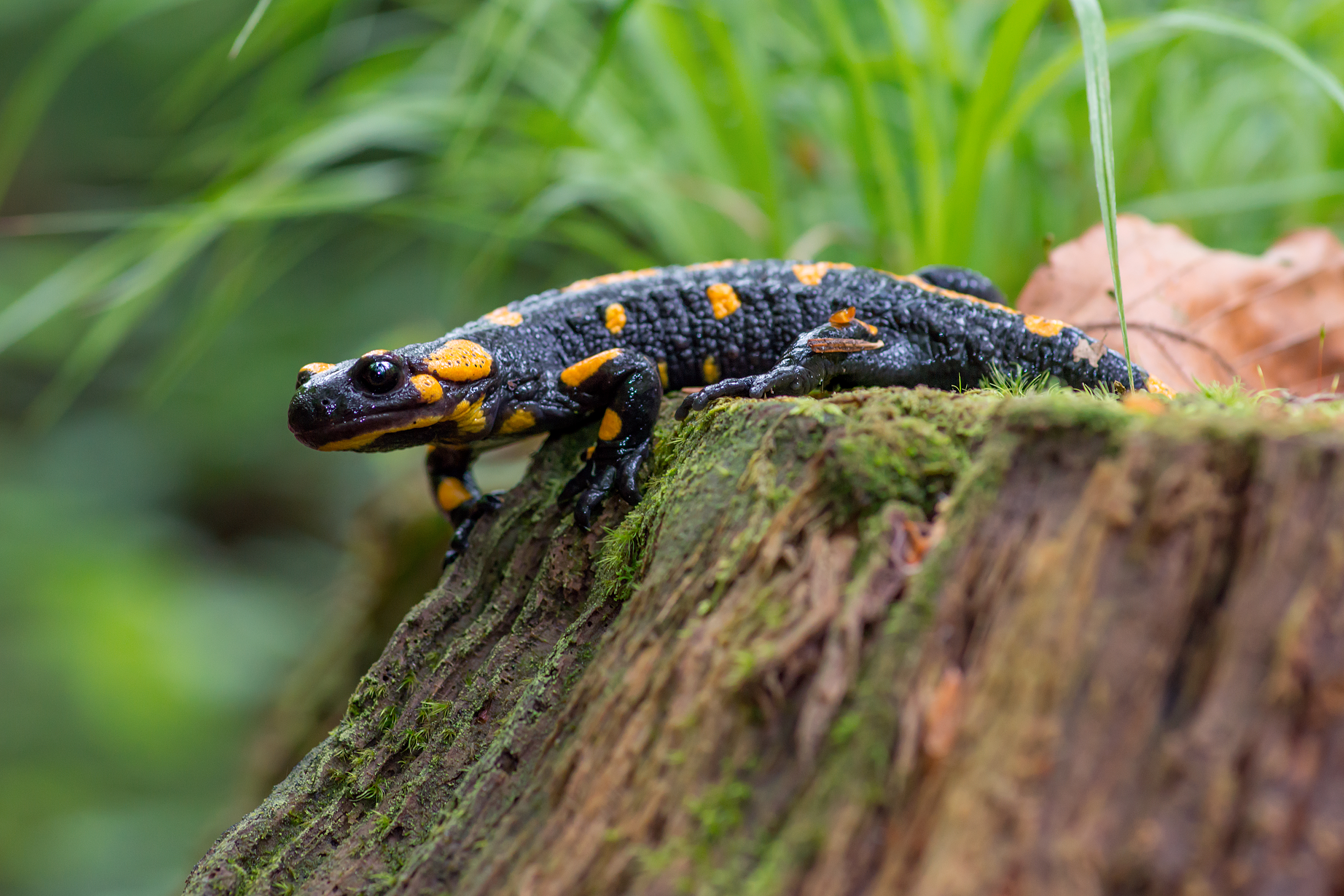 Саламандра в околицях скель Соколине око, НПП "Вижницький"